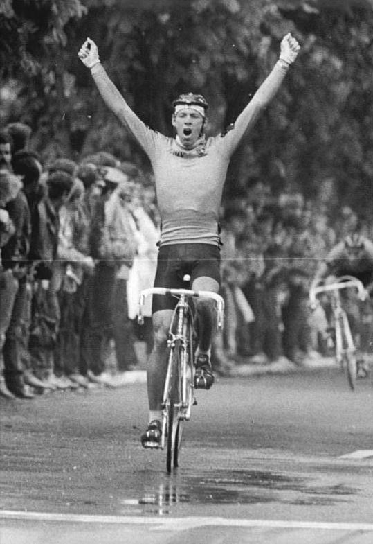 Johannes Draaijer ADN-ZB Kasper 21.5.87 Polen: 40. Internationale Friedensfahrt-12. Etappe von Legnica nach Wroclaw über 180 km- Der 25jährige Niederländer Johannes Draaijer jubelt im Ziel. Er hatte bereits die fünfte Etappe von Gera nach Most zu seinen Gunsten entschieden.